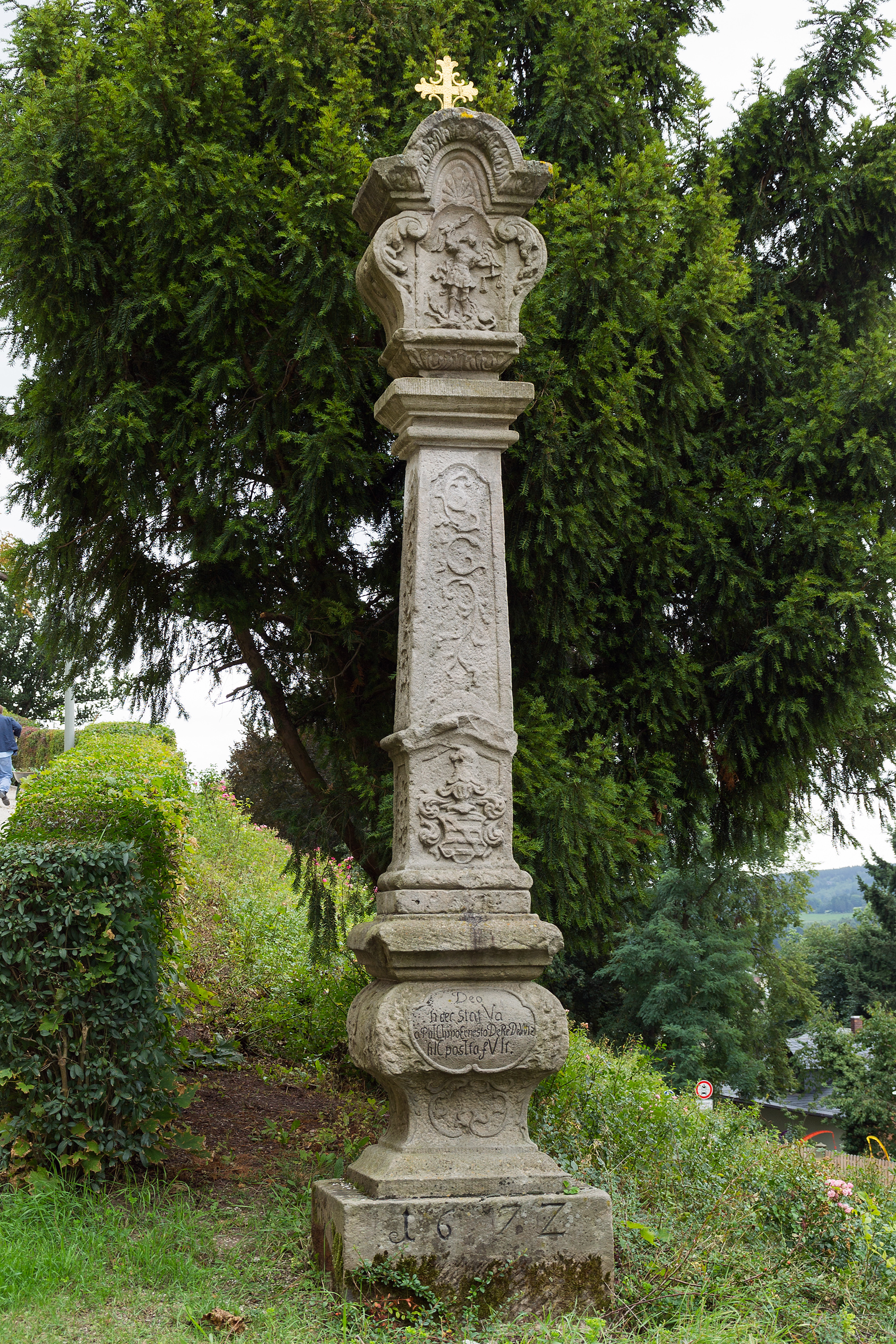 Marter in der Festungsstraße in Kronach, unterhalb der Bastion St. Kunigunde der Festung Rosenberg.